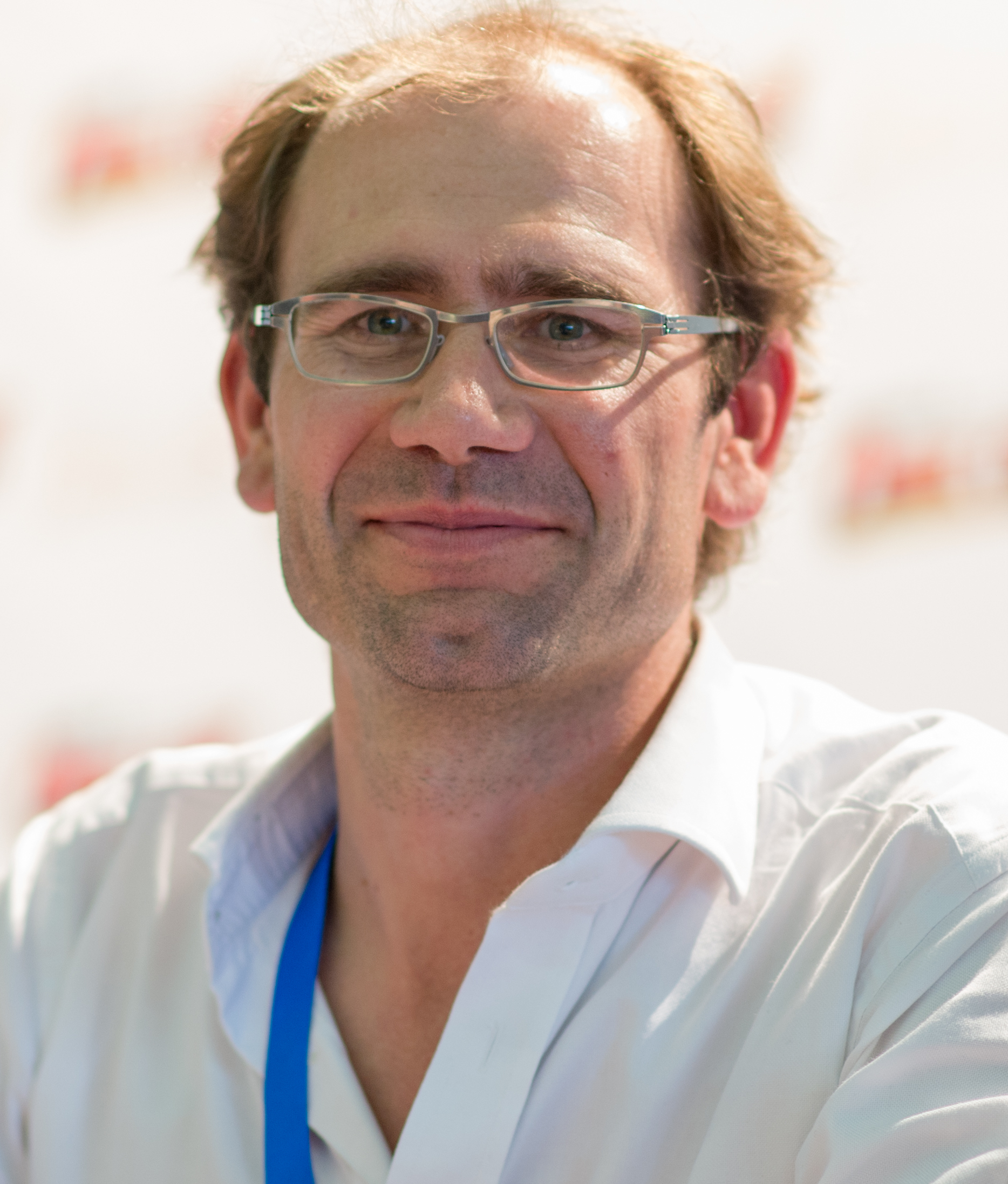 Etienne Fague au Comic Con #5 - Paris